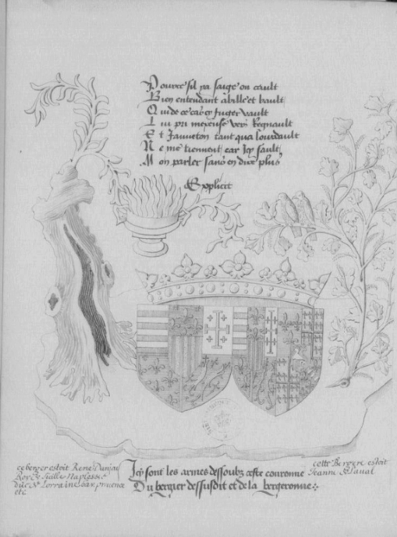 René d'Anjou, Regnault et Jehanneton, colophon with heraldic clue. BNF fr. 12178